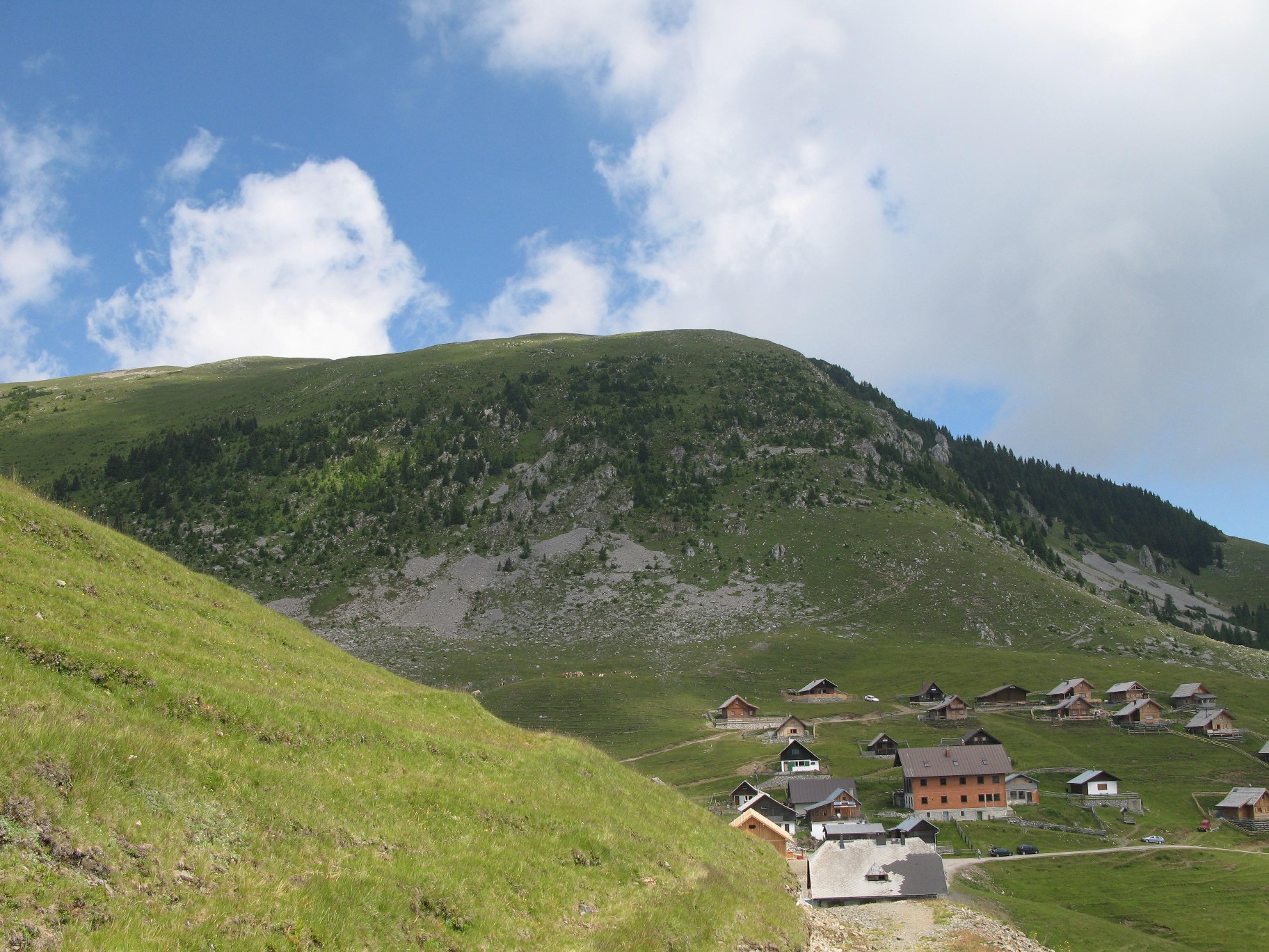 Ojstrnik nad Bistriško planino v Karnijskih Alpah